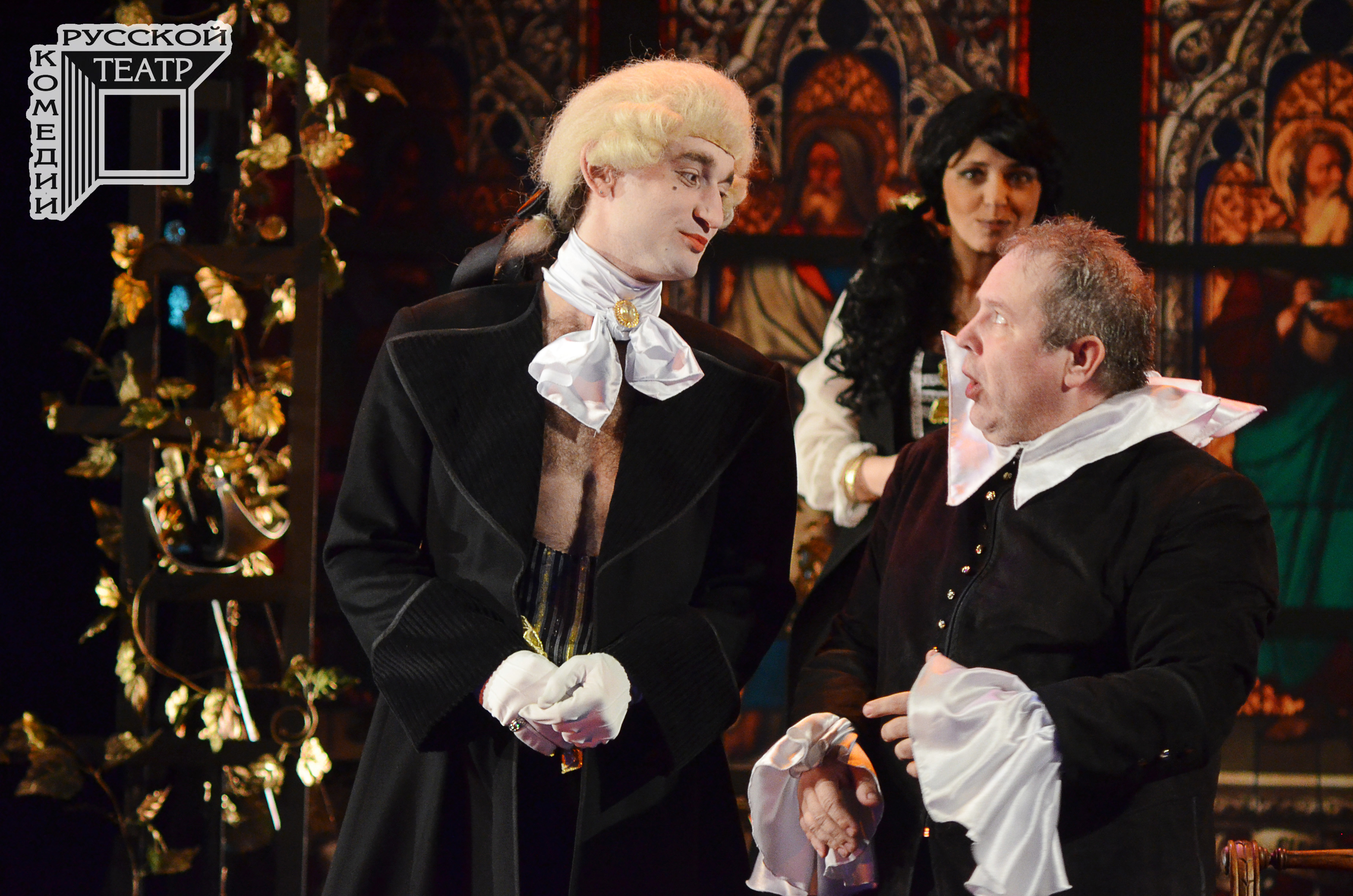 Сцена из спектакля «Брак поневоле» Альсид – Илья Боробов, Сганарель – Михаил Юдин Саратовский театр русской комедии Лауреат VII областного театрального фестиваля «Золотой Арлекин» — Илья Боробов за роль Альсида в спектакле «Брак поневоле», в номинации «Дебют», 2014 г.